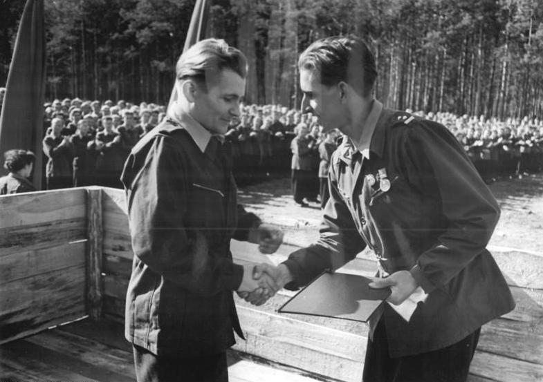 Zentralbild Heilig 16.9.1952 Hei-Ho. Lager des "Dienst für Deutschland" feierlich eröffnet. Am Sonntag, dem 14.9.1952 wurden Lager der Organisation "Dienst für Deutschland" feierlich eröffnet. Unsere Bilder zeigen die Eröffnung eines Lagers im Kreis Pasewalk. UBz: Der Lagerleiter Martin Ebert (rechts) überreicht dem stellvertretenden Leiter der Hauptverwaltung, Otto Findeisen, Selbstverpflichtungen der Mitglieder des Lagers zu Ehren der feierlichen Eröffnung."